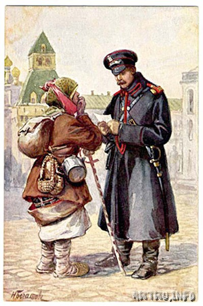 Картины Николая Алексеевича Богатова (1854—1935)